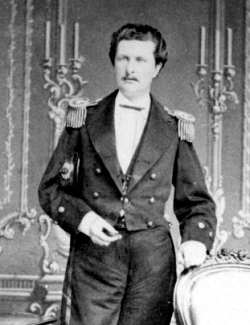 Luis Uribe Orrego (*Copiapó, Chile, 13 de agosto de 1847 - †Valparaíso, Chile, 17 de julio de 1914), marino chileno.